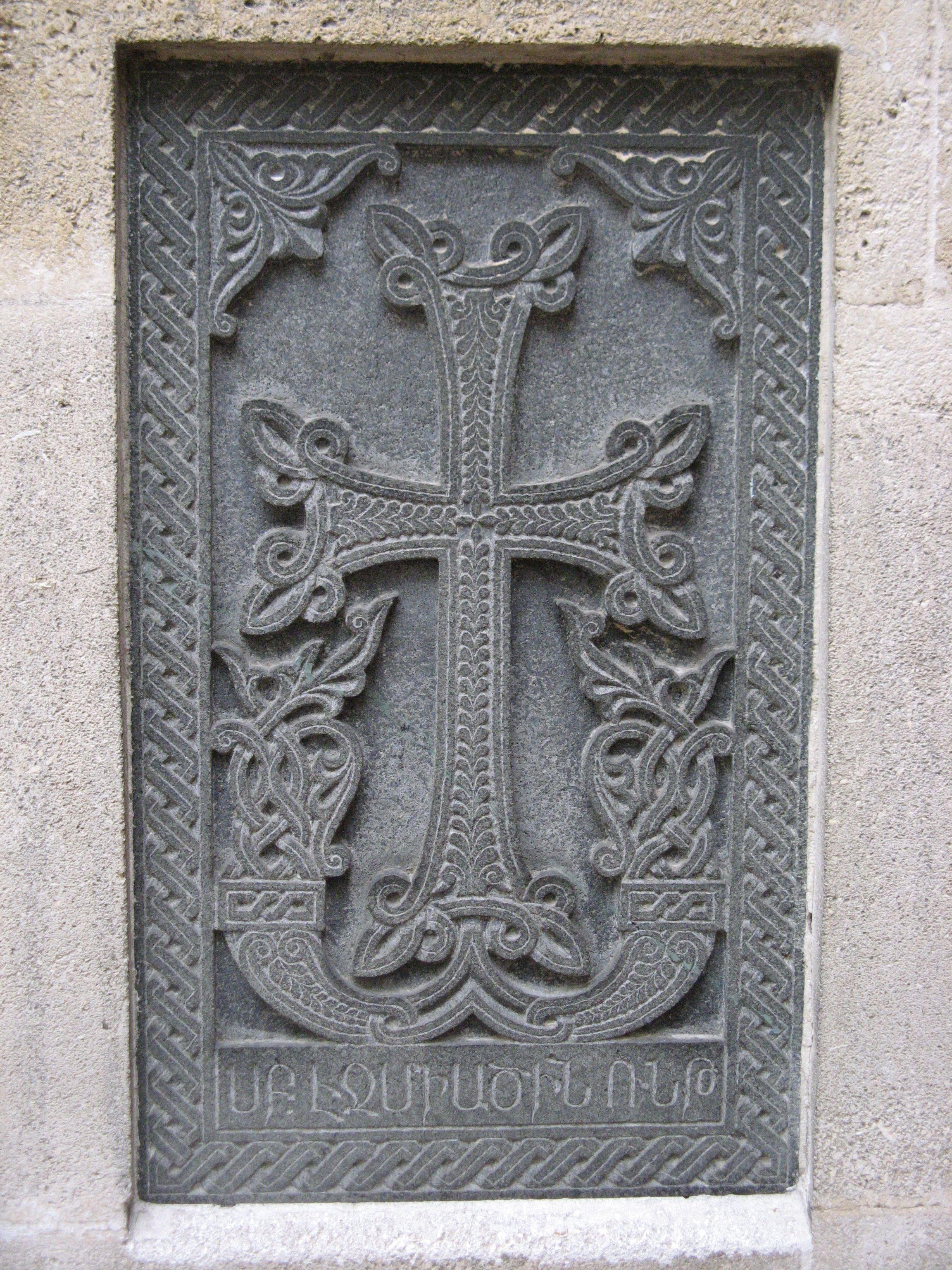 Kreuzrelief, Armenische Kirche St. Hripsime, Kolonitzgasse 11, Wien-Landstraße